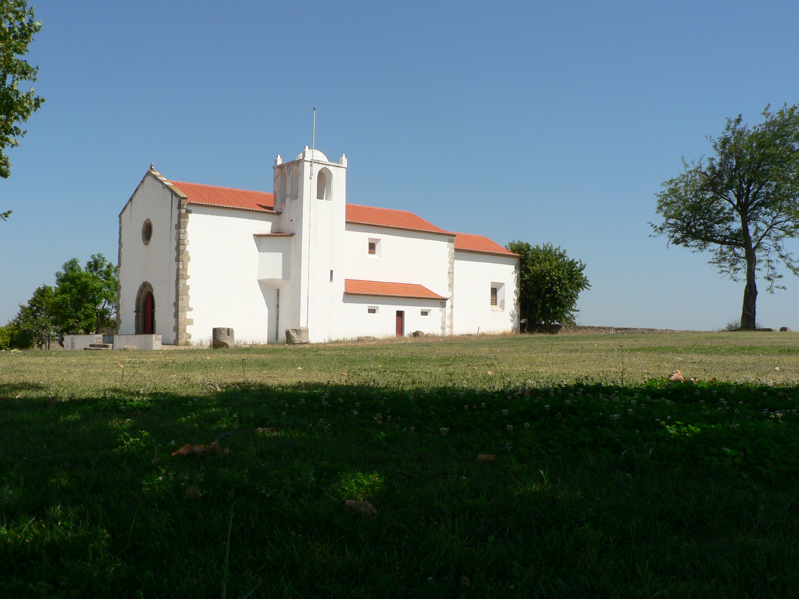 l'église à l'intérieur de la cours du château d'Abrantes, Portugal